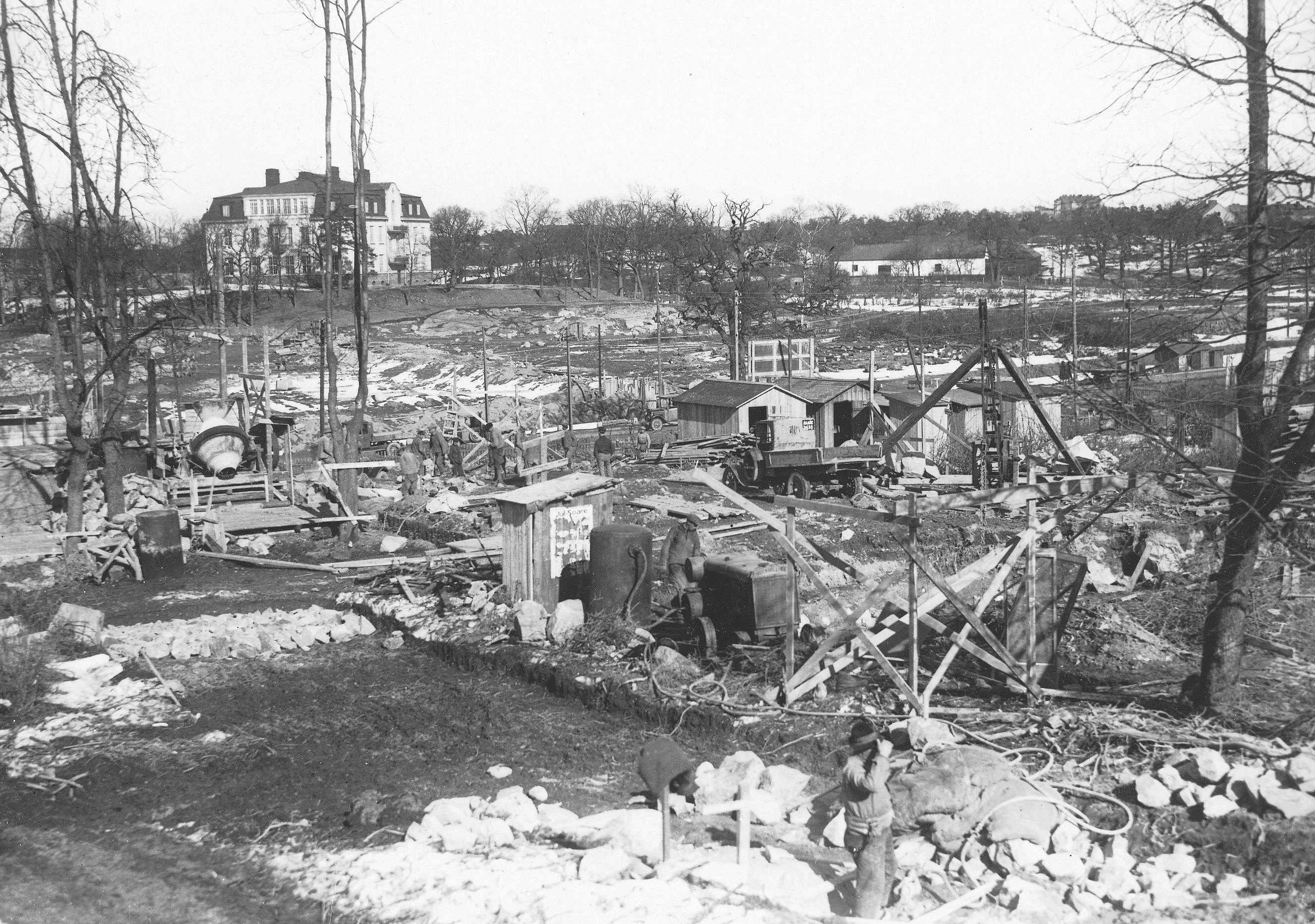 Byggarbeten för Fredhällsparken, i bakgrunden syns "Kullskolan"